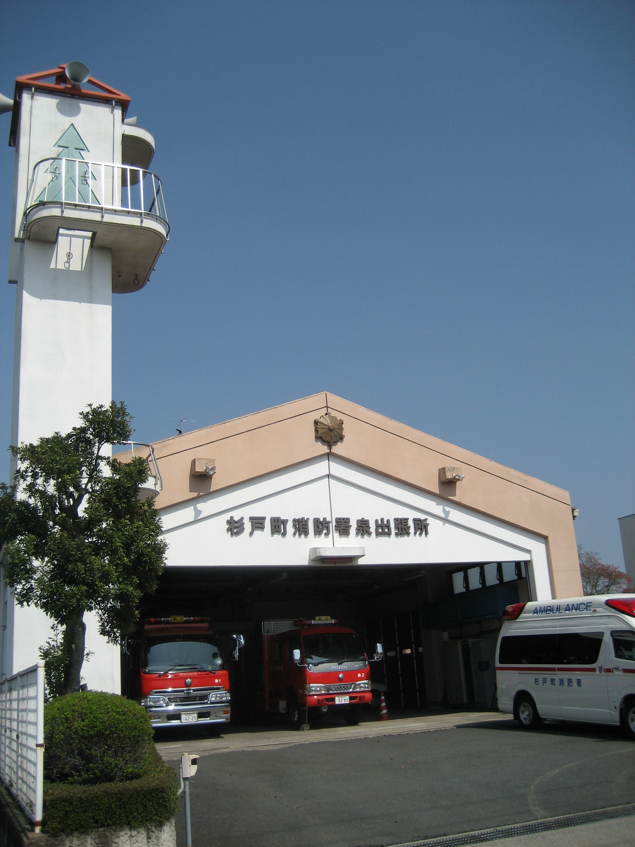 杉戸町消防本部・消防署泉出張所